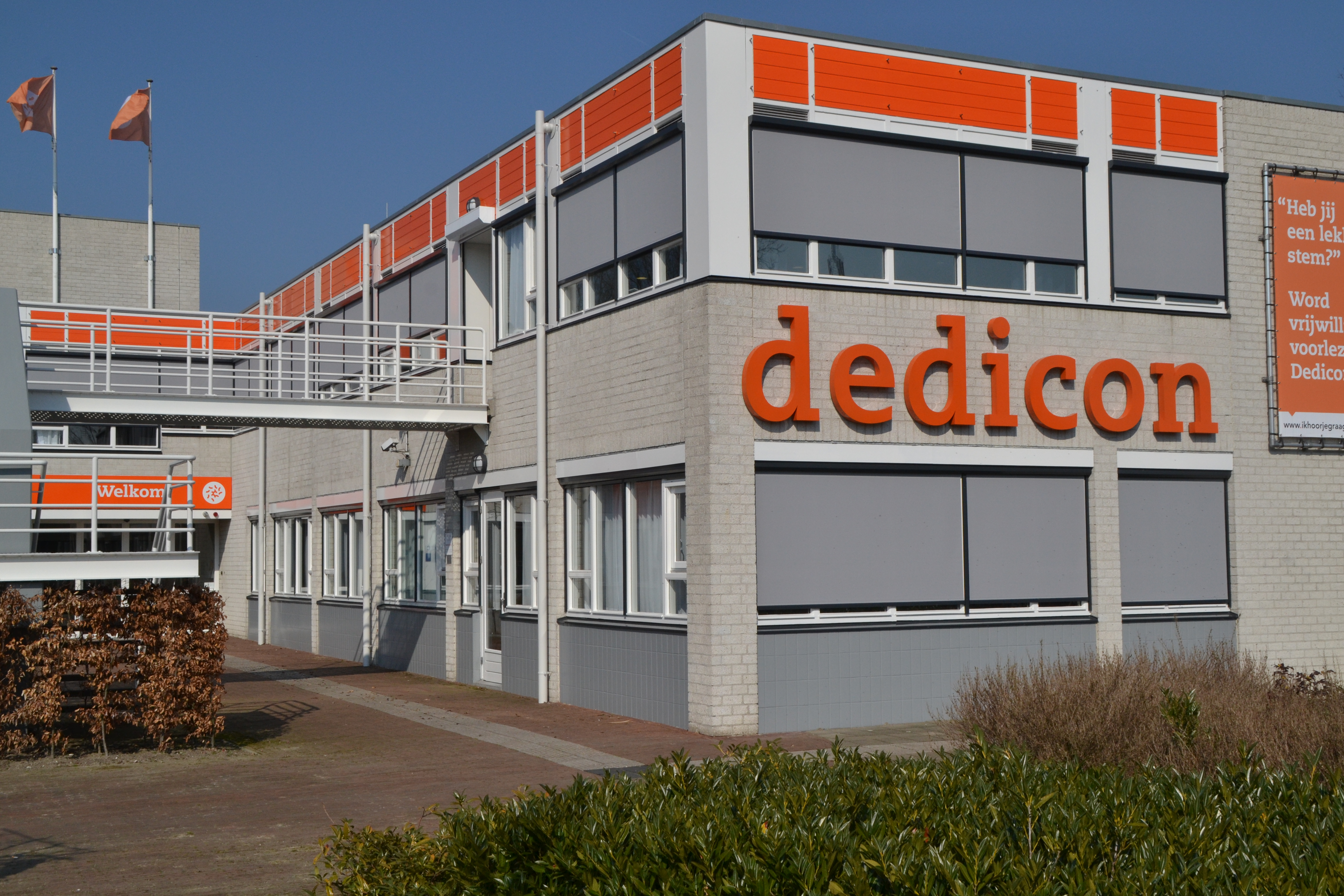 Vooraanzicht van de entree van Dedicon in Grave